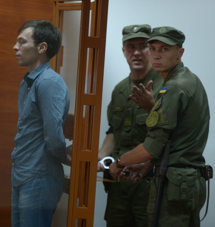 Журналист Муравицкий В.А. в Житомирском областном апелляционном суде.